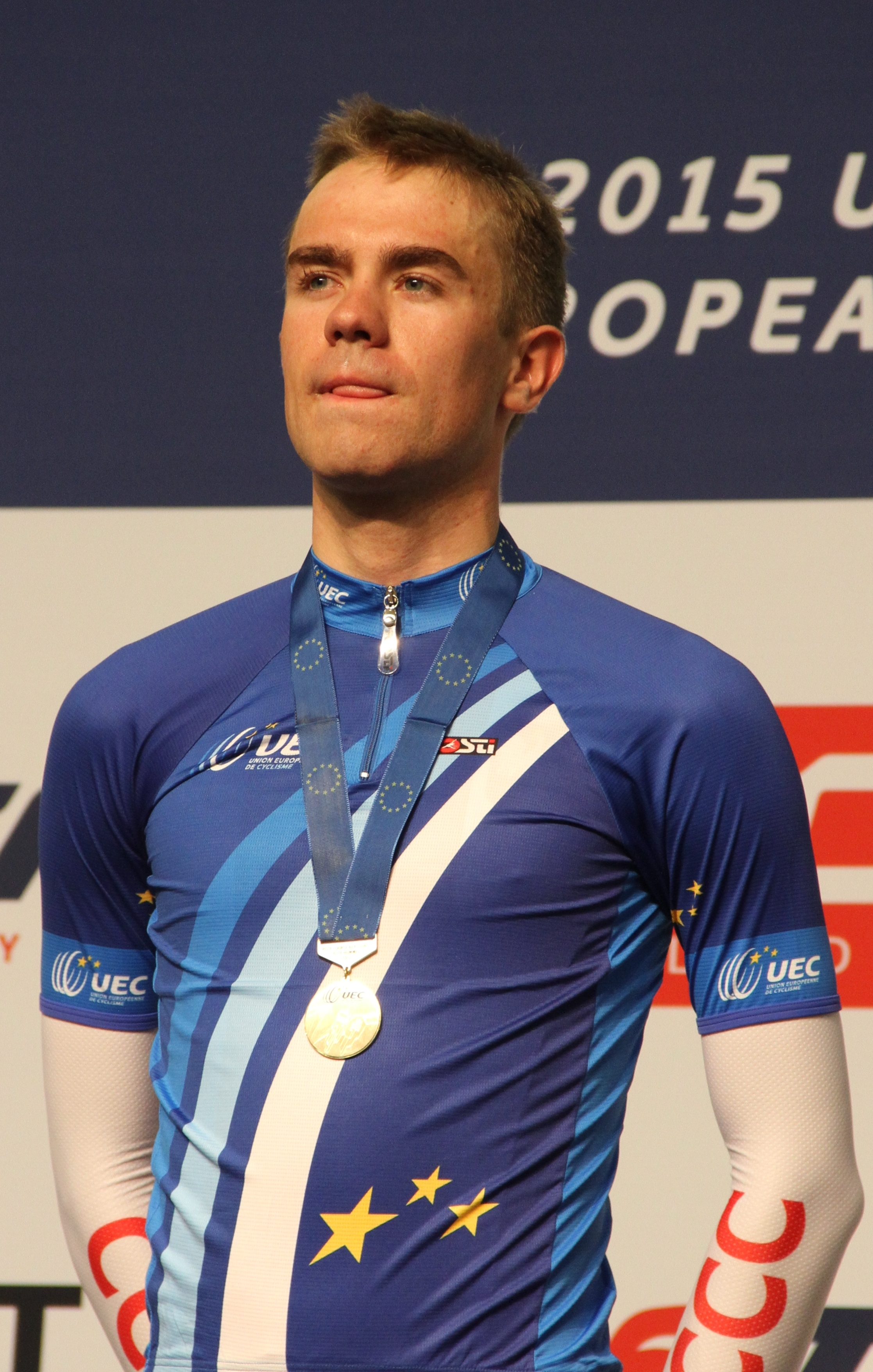 Wojciech Pszczolarski, polnischer Radsportler, Gold im Punktefahren The making of this document was supported by the Community-Budget of Wikimedia Germany.